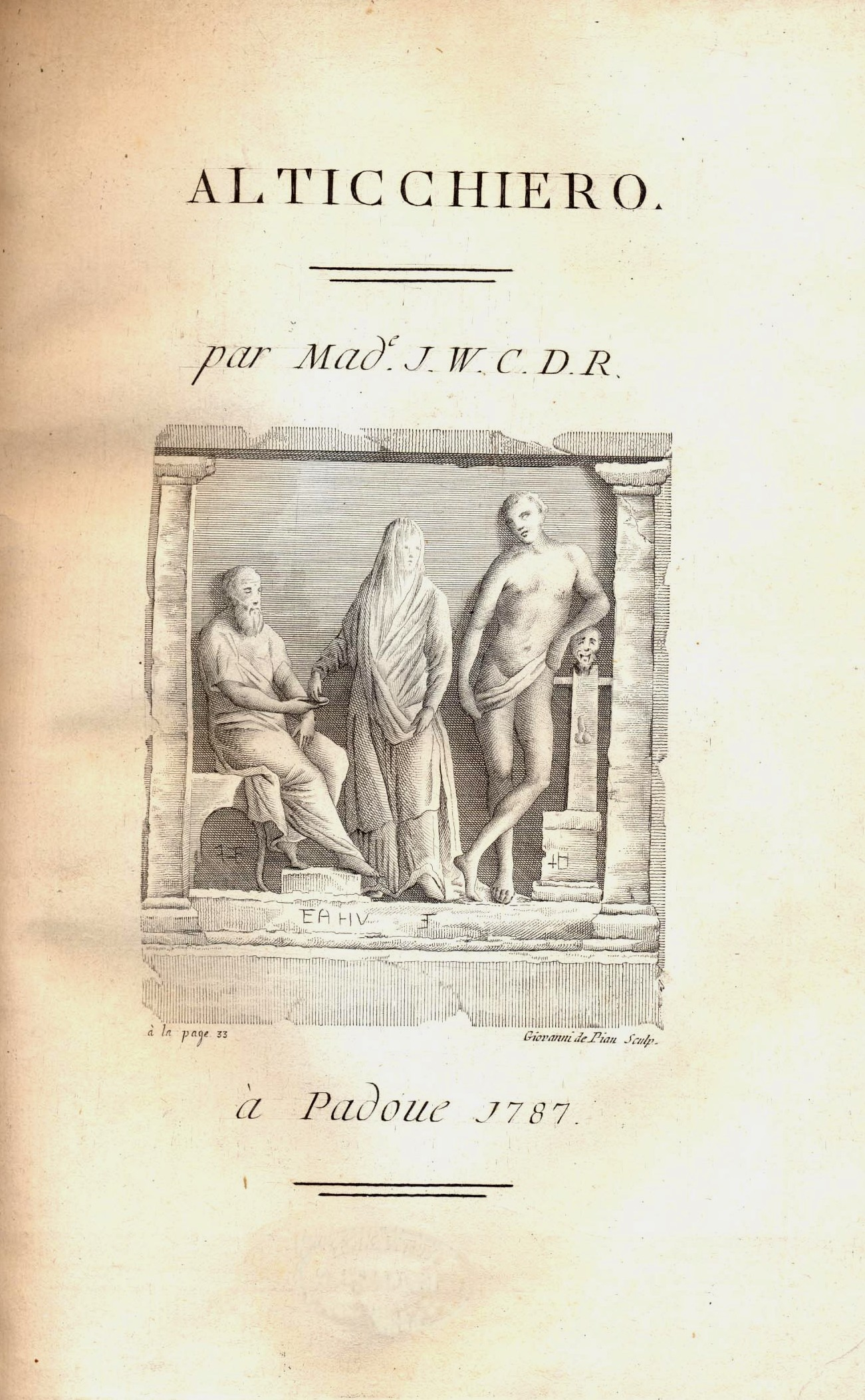 Frontespizio dell'opera "Alticchiero" di Giustiniana Wynne. Il testo è di 80 pagine più note e 30 incisioni attribuite ad Antonio Sandi e Giovanni de Pian. L'abbreviazione presente nel frontespizio si legge J(ustine) W(ynne) C(omtesse) D(e) R(osenberg). Contiene la descrizione della villa del senatore Angelo Querini ora perduta. Seconda edizione Padova 1787. Una copia di questa edizione, con dedica di Bartolomeo Benincasa è alla Biblioteca Casanatense di Roma (Collocazione VOL.MISC.1741.3). La riproduzione del frontespizio è stata effettuata da una copia di proprietà dell'utente.